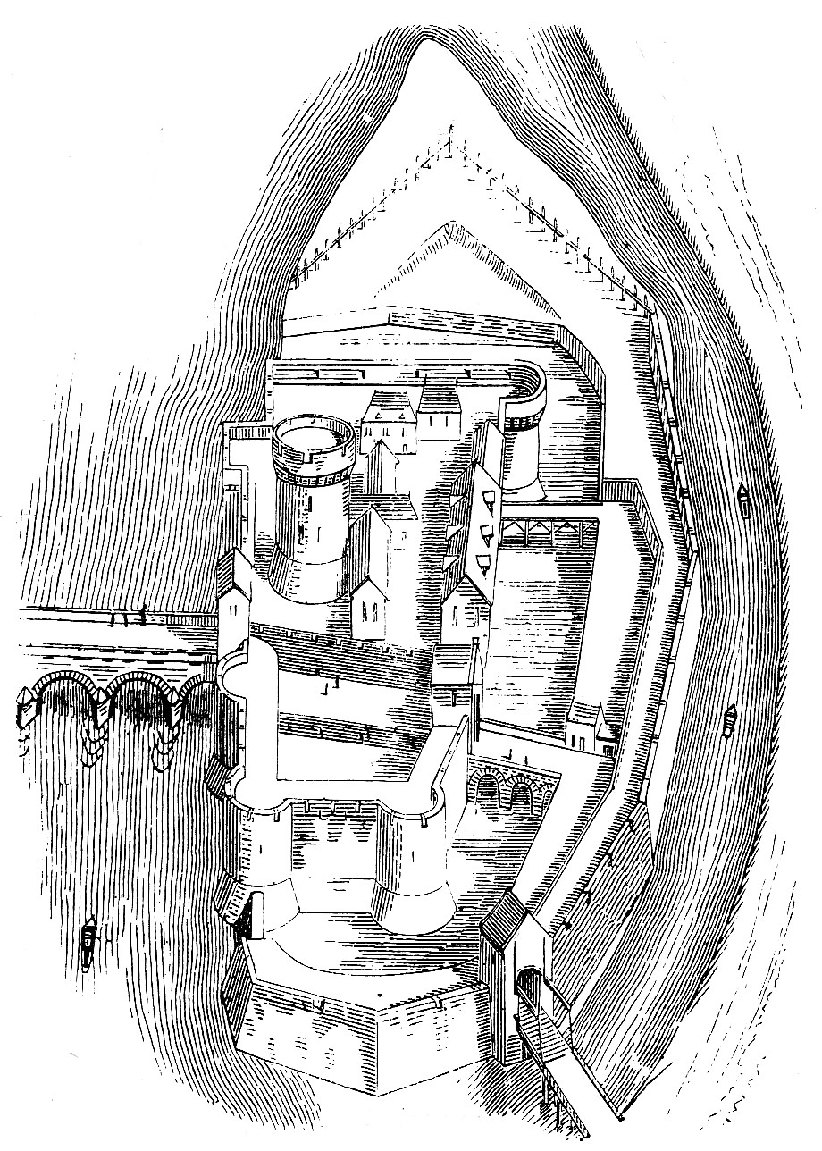 Châtelet de Pont-de-l'Arche, autrement dénommé Fort de Limaie - France